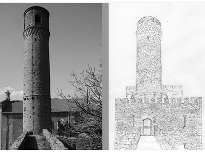 Torre cilindrica e ipotetica ricostruzione storica.